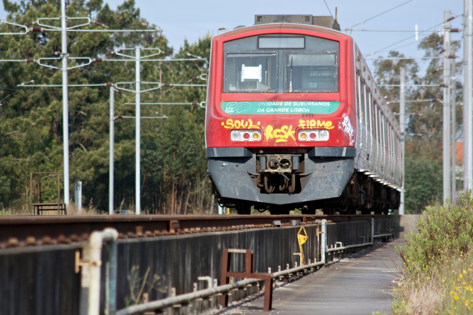 Local: Estação do Poceirão [Linha do Alentejo, PK 30] Data e hora: 30 de Abril de 2013 [08h33] Material: Automotora 2401 [Unidade Quádrupla Eléctrica]